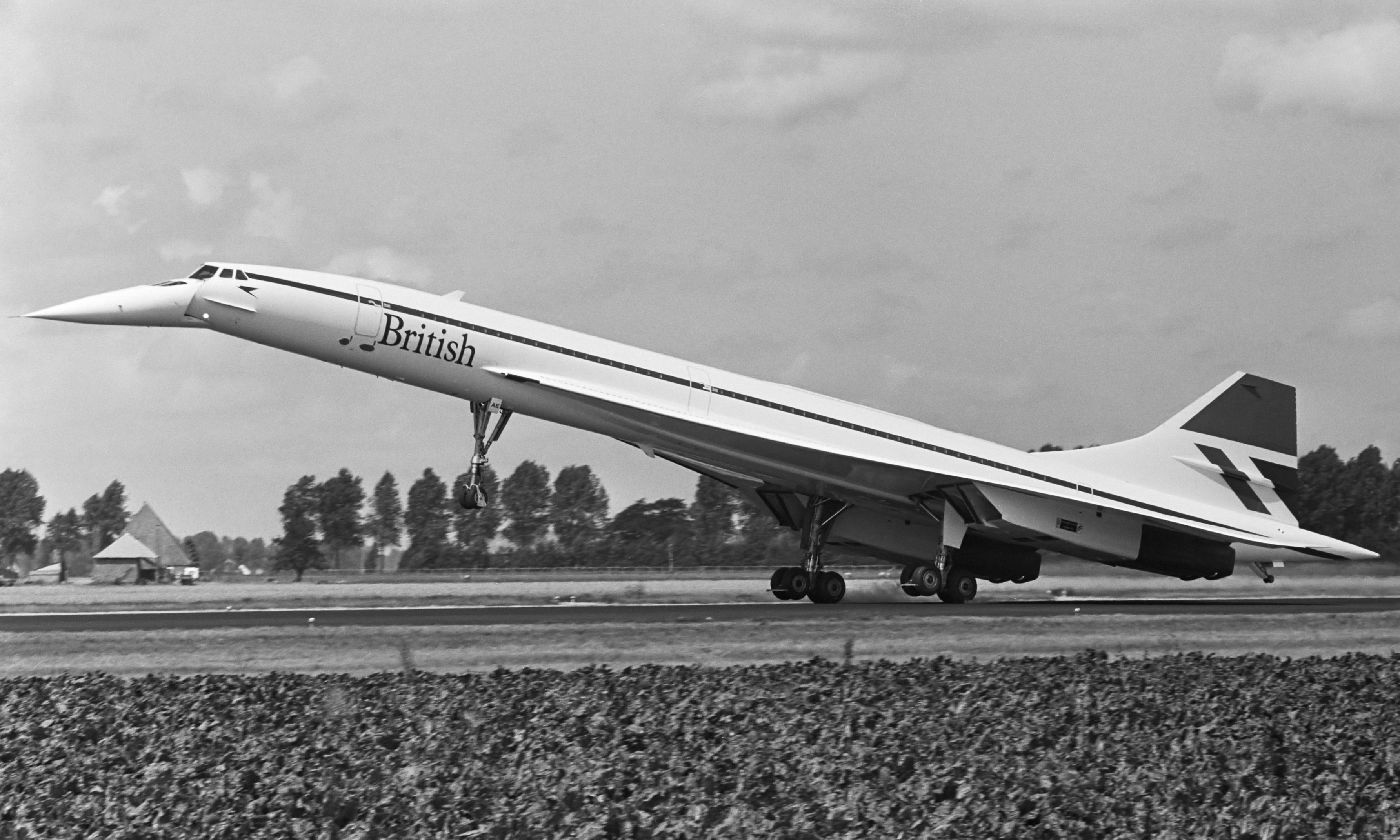 Concorde (vliegtuig) weer (tweede keer) even op Schiphol; landing van de Concorde 14 augustus 1982